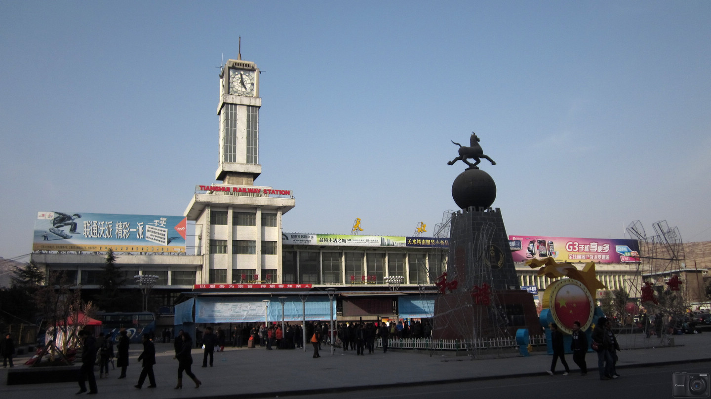 火车站广场